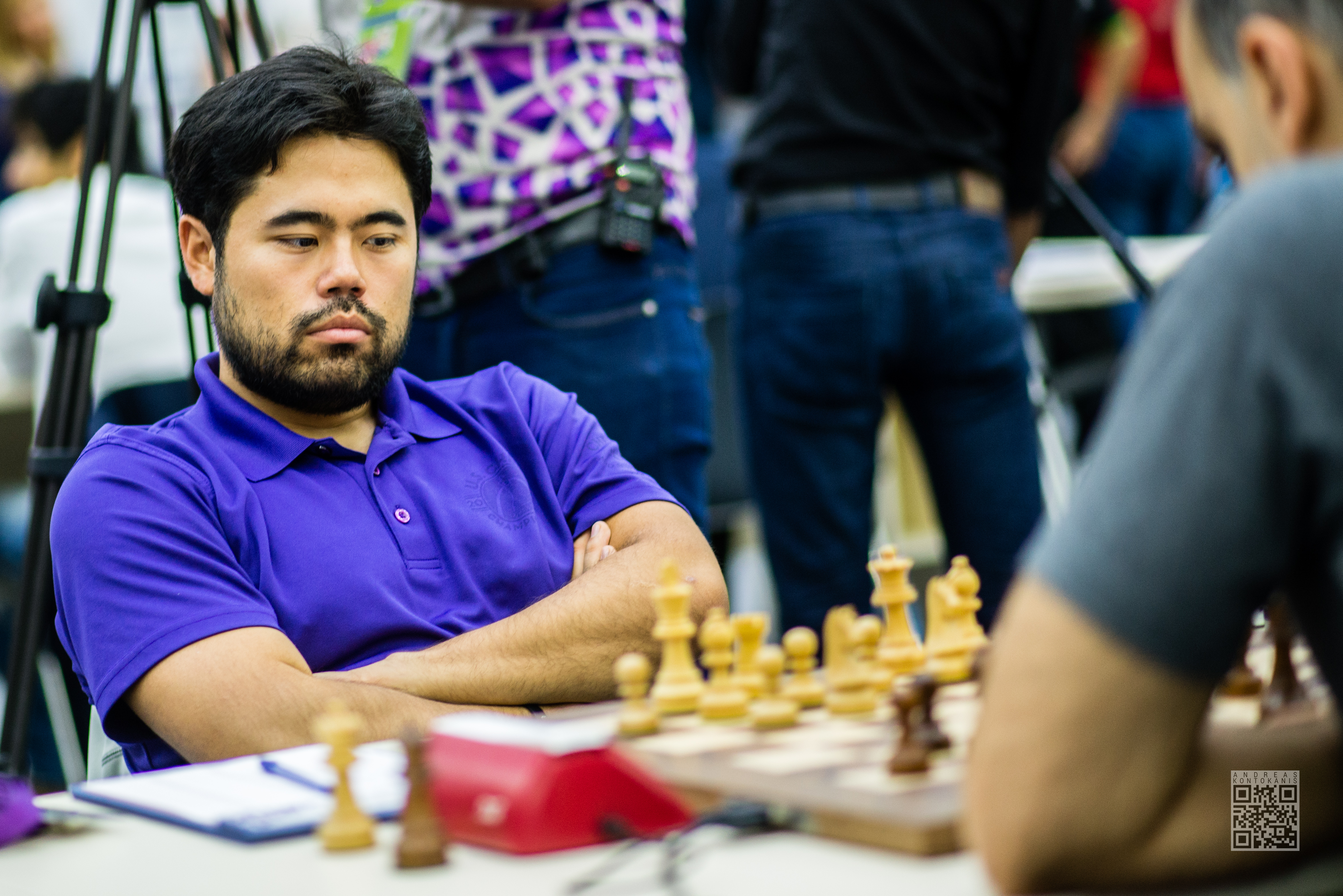 Hikaru Nakamura